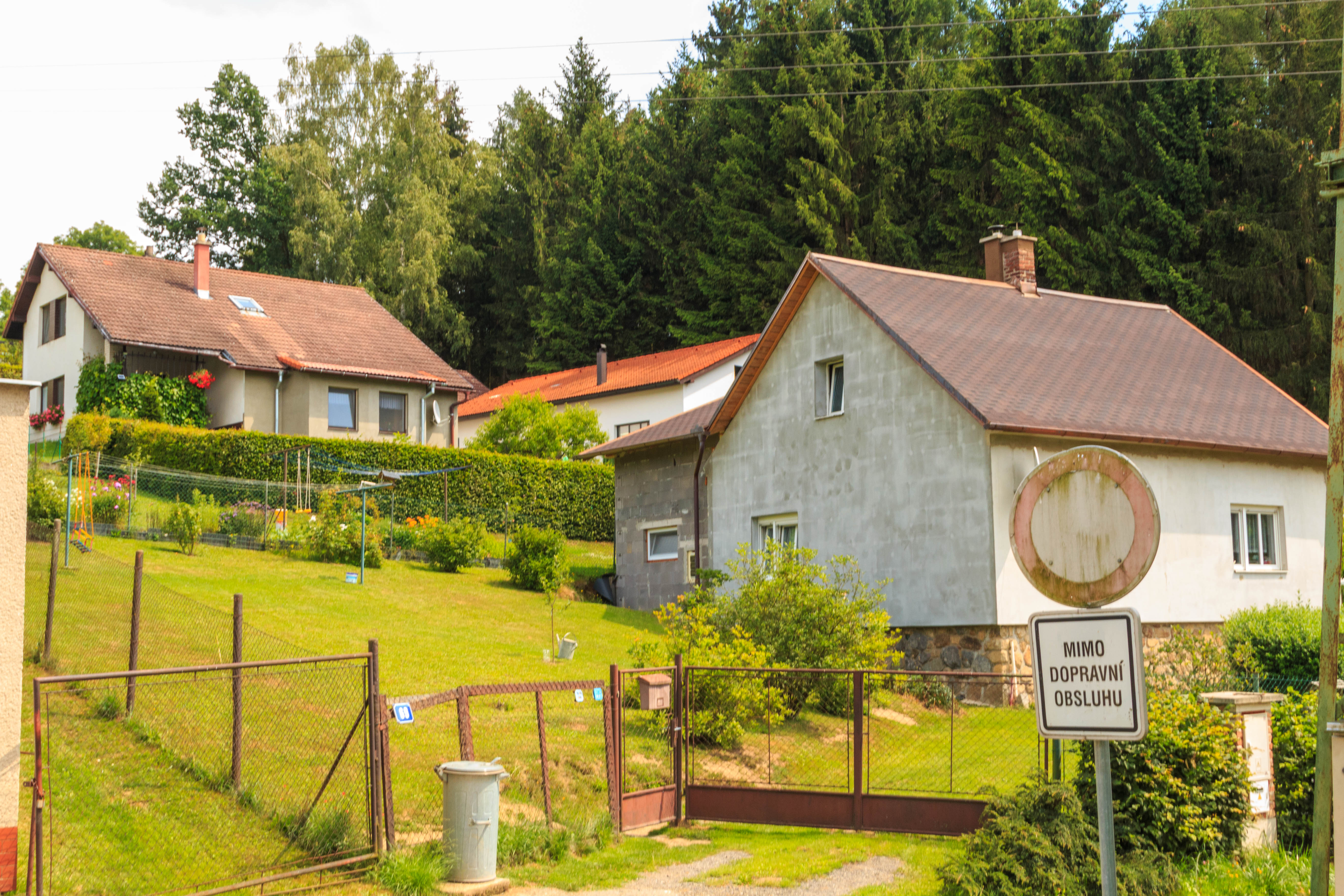 Herlify čp. 69